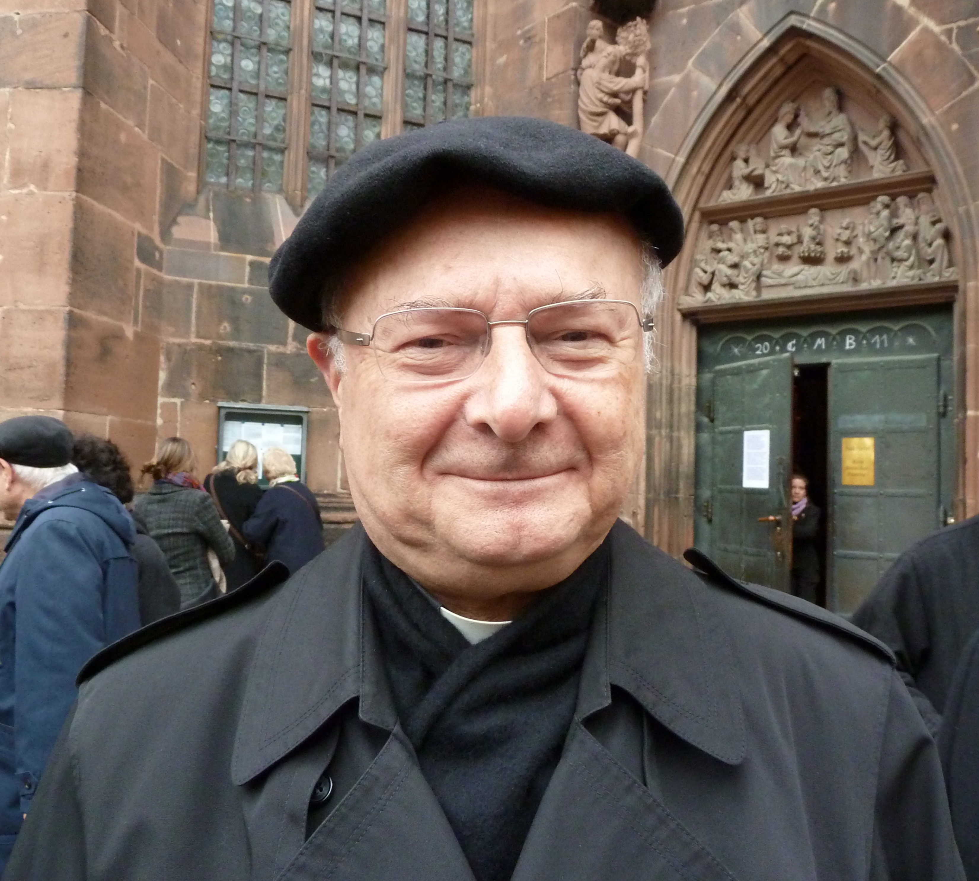 Erzbischof Dr. Robert Zollitsch vor der Segenspforte des Freiburger Münsters nach dem Weihnachstgottesdienst 2011.